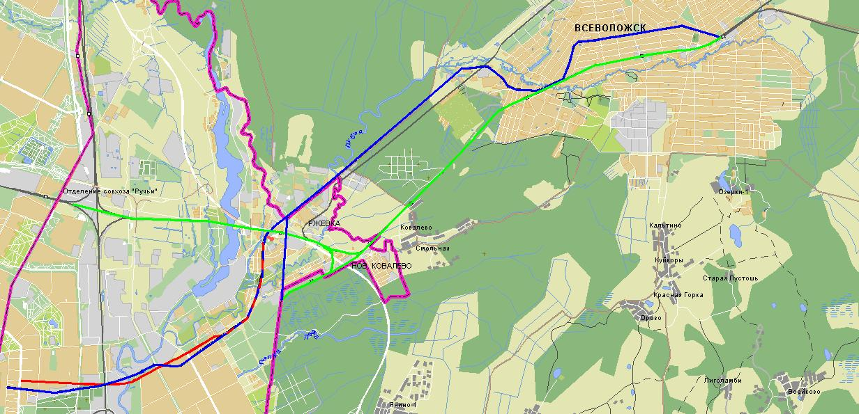 Траектории трасс современного Ириновского пр. (красный), старой Ириновской ж/д (синий) и современной Ириновской ж/д в Санкт-Петербурге (зелёный)